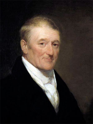 Portrait de John Molson. Sr. John Molson (Moulton, Lincolnshire, 28 décembre 1763 - Boucherville, 11 janvier 1836) fut un grand brasseur et entrepreneur montréalais. Il fonda la brasserie Molson.